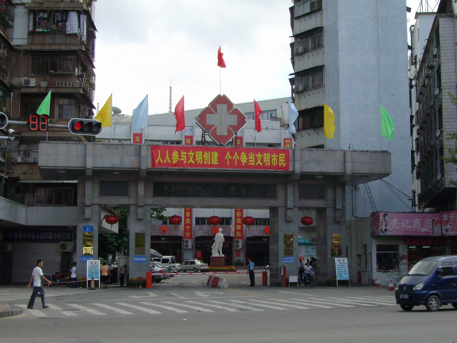 惠州市中心人民医院正门